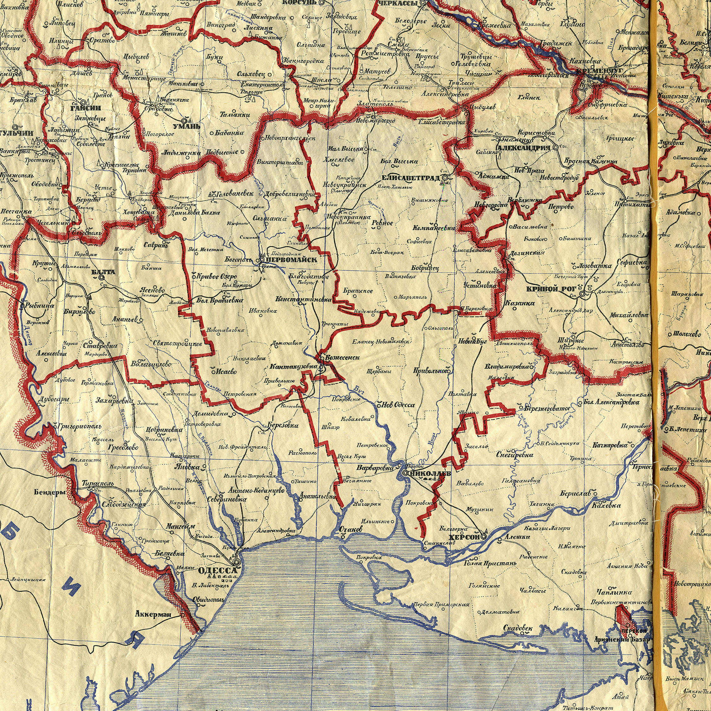 Одеська губернія, , фрагмент мапи Української соц. рад. республіки, адміністративний поділ після 12 квітня 1923 року